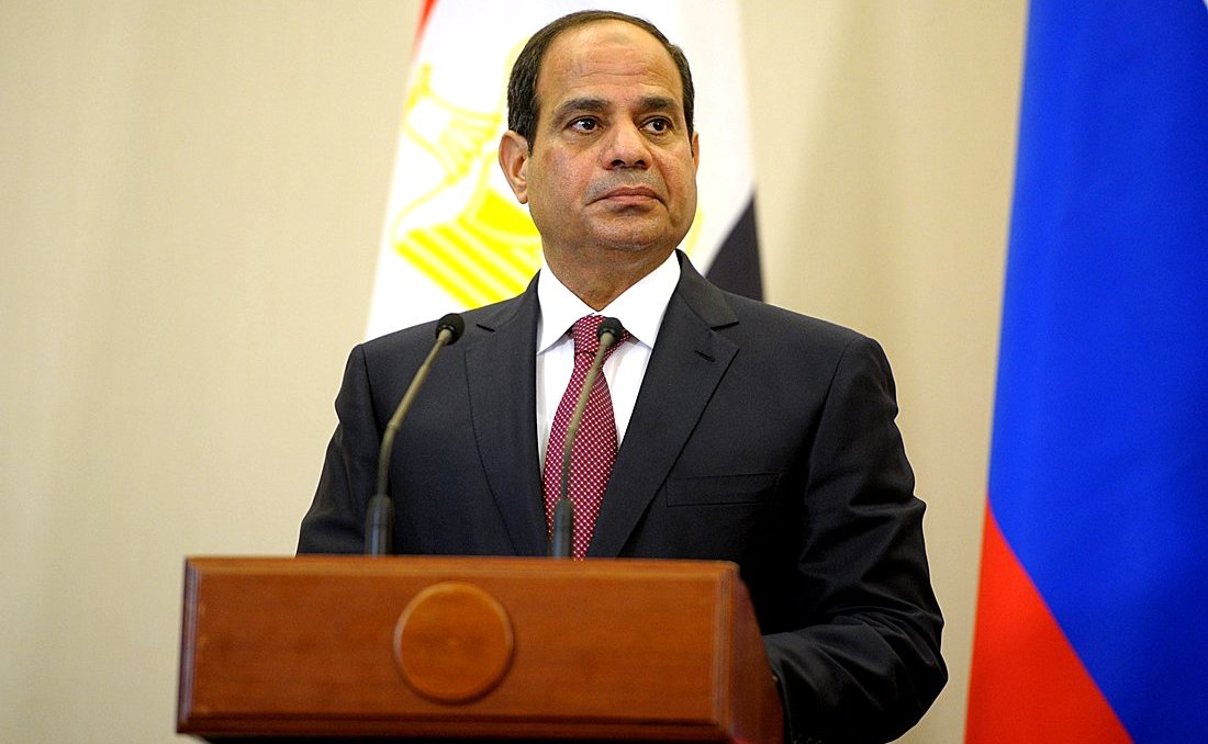 Президент Республики Египет Абдельфаттах Сиси